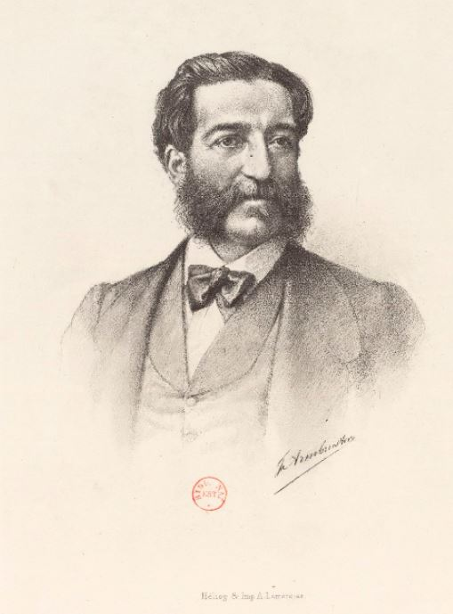 Jean-François Armbruster, (1835-1912) autoportrait